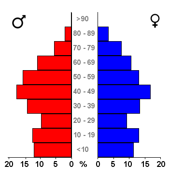 Age pyramids for the 443 municipalities in the Netherlands. Data 2007. Statistics provided by Centraal Bureau voor de Statistiek, Voorburg/Heerlen. Source: Tabel: Bevolking Nederland per gemeente en diverse regio's naar leeftijd, geslacht en burgerlijke staat, 1 januari 1988-2007. Gewijzigd op 24 mei 2007 (on-line database StatLine) Bevolkingspiramide - Gemeente Kessel (2007).png